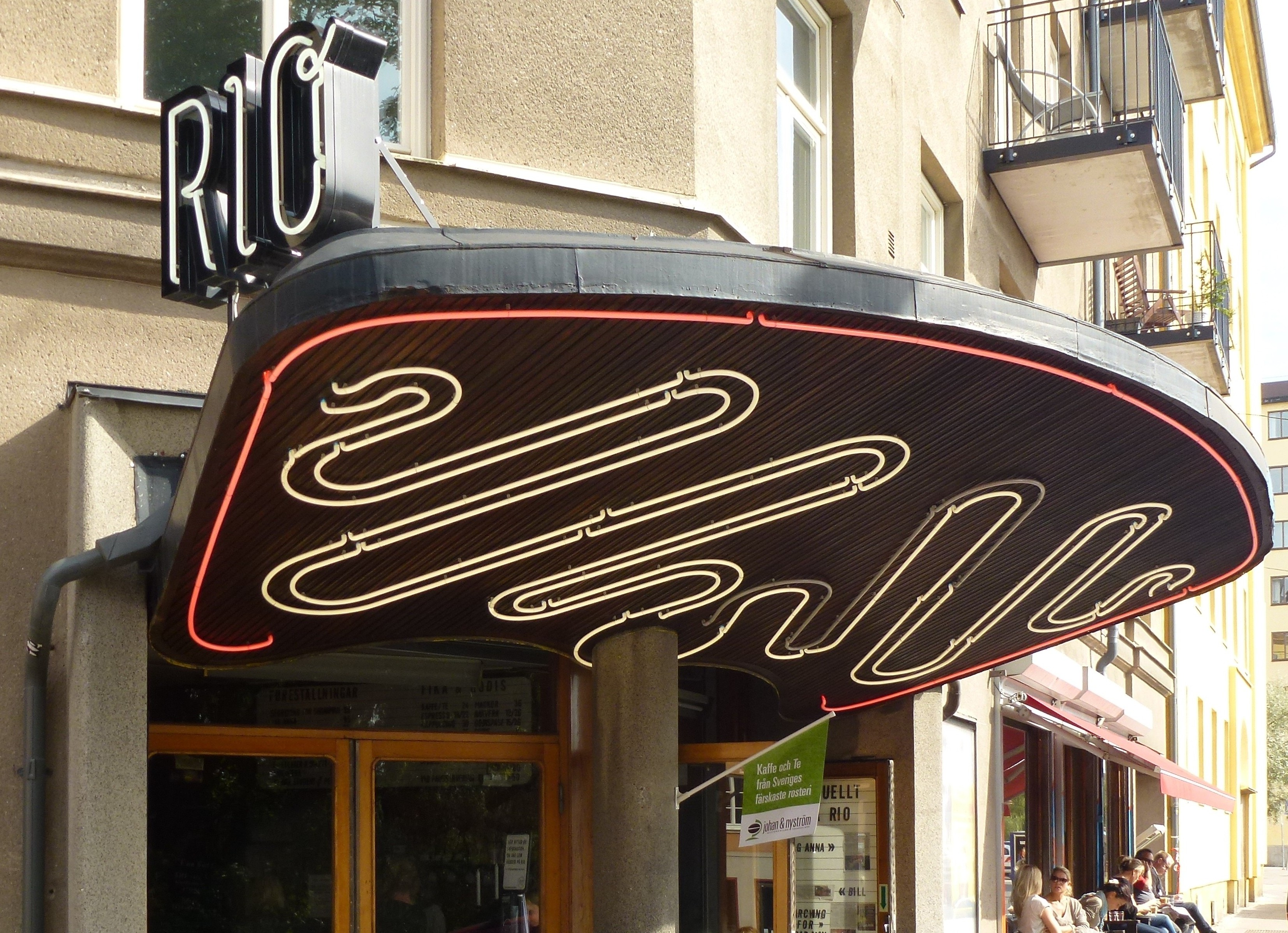 Biografen RIO:s baldakin